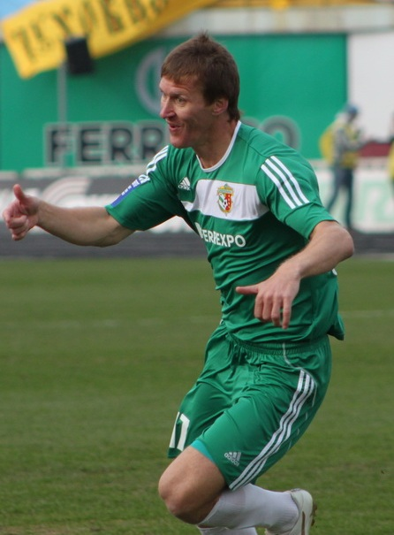 Василь Сачко відмічає забитий гол